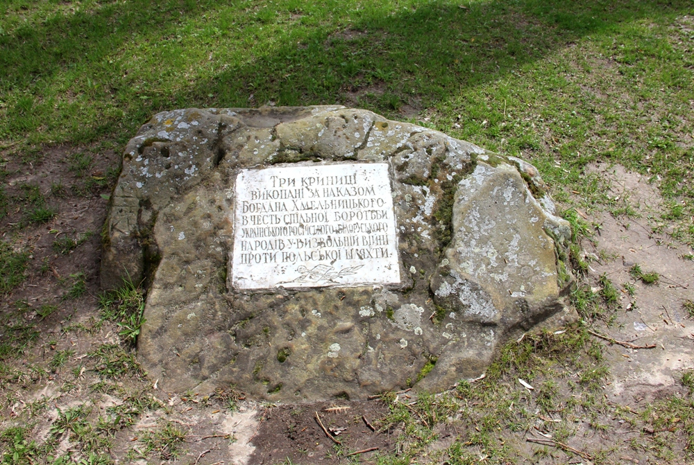 Урочище «Три криниці», Суботів